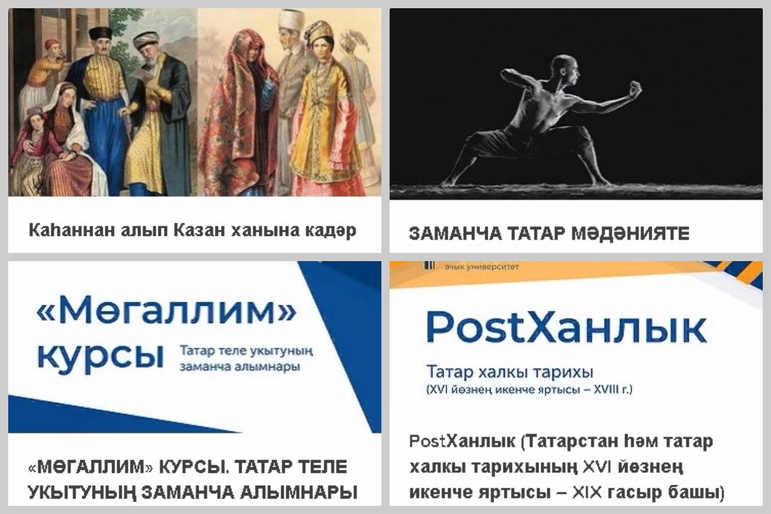 Ачык университетның online курслары афишалары